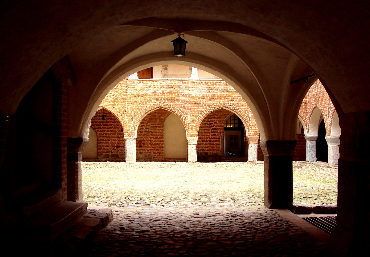 Zamek biskupi w Lidzbarku Warmińskim - dziedziniec z krużgankami, XIV w. (zabytek nr A-99)